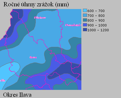 Zrážky v okrese Ilava.